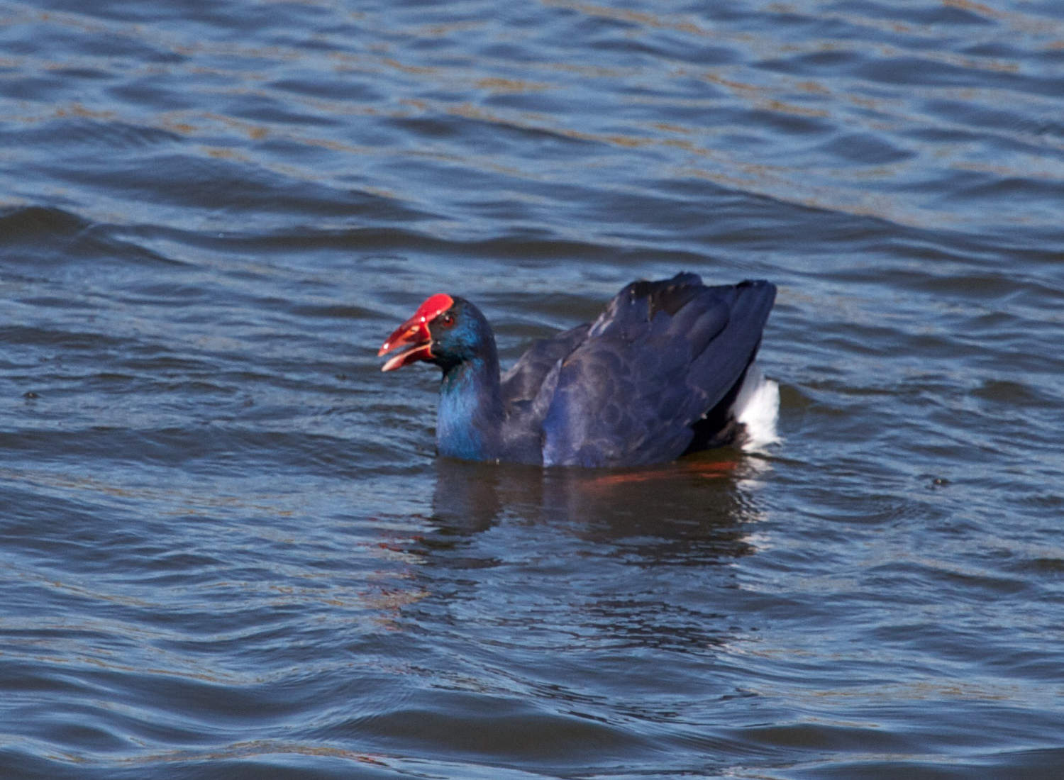 Porphyrio porphyrio, Pêra, Algarve, Portugal